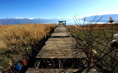 Поглед кон Преспанско езеро, Преспа, Македонија. Лиценцирање